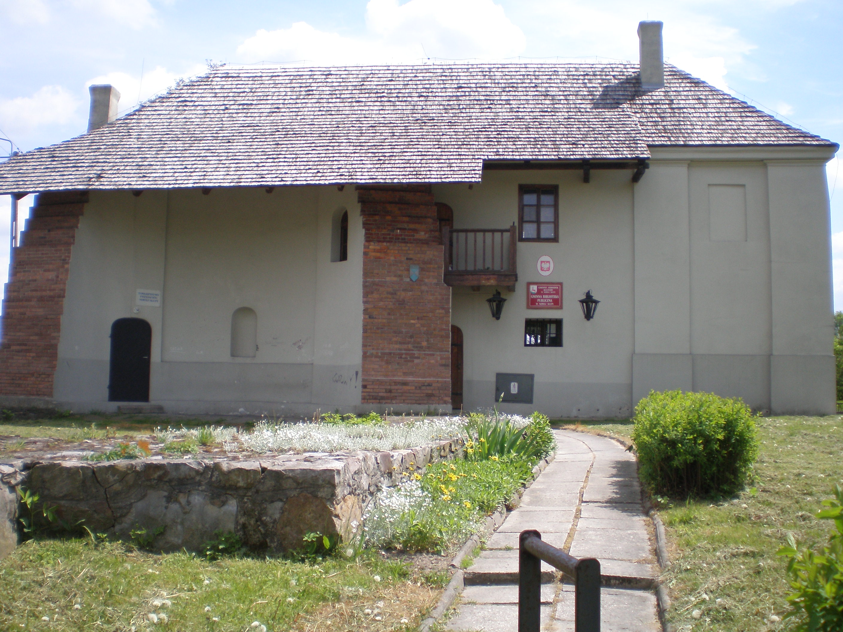 Nowa Słupia, ul. Świętokrzyska 53a - pierwotnie plebania, tzw. dom opata, obecnie budynek mieszkalny (dec. szkoła benedyktyńska), l. 60. XVIII, pocz, XIX, XX w